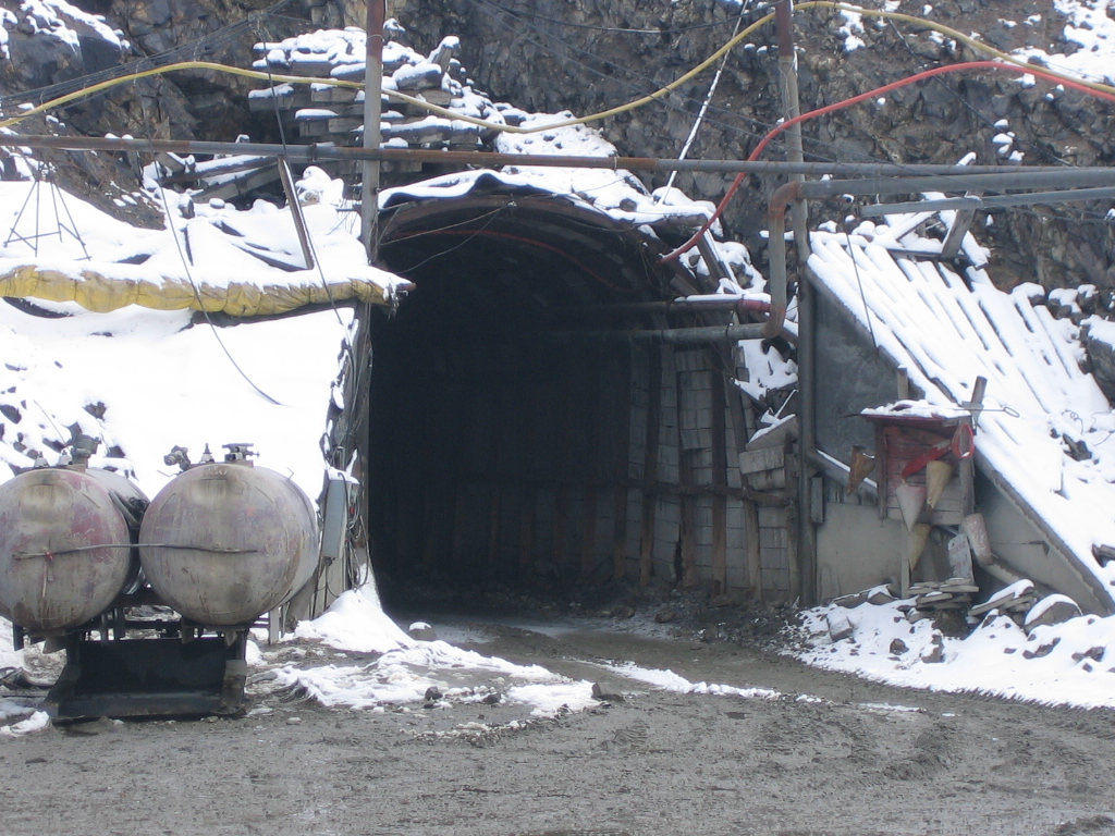 Gallery 22 (Штольня №22), level 980 m